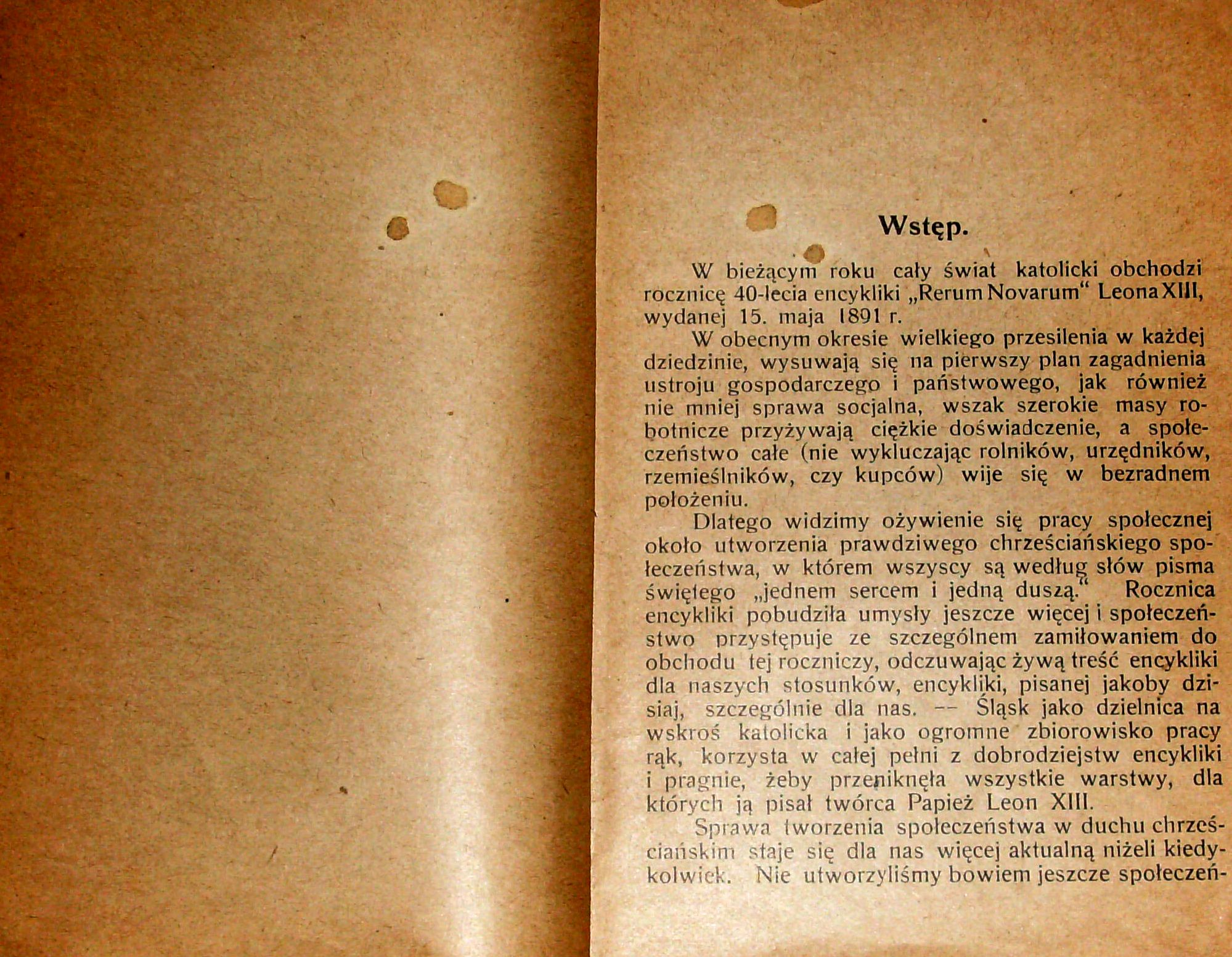 Stanisław Krzyżowski, Rozmyślania w czterdziestą rocznicę encykliki „Rerum novarum”, wydanej 15 maja 1891 r. przez papieża Leona XIII, Pszczyna 1931